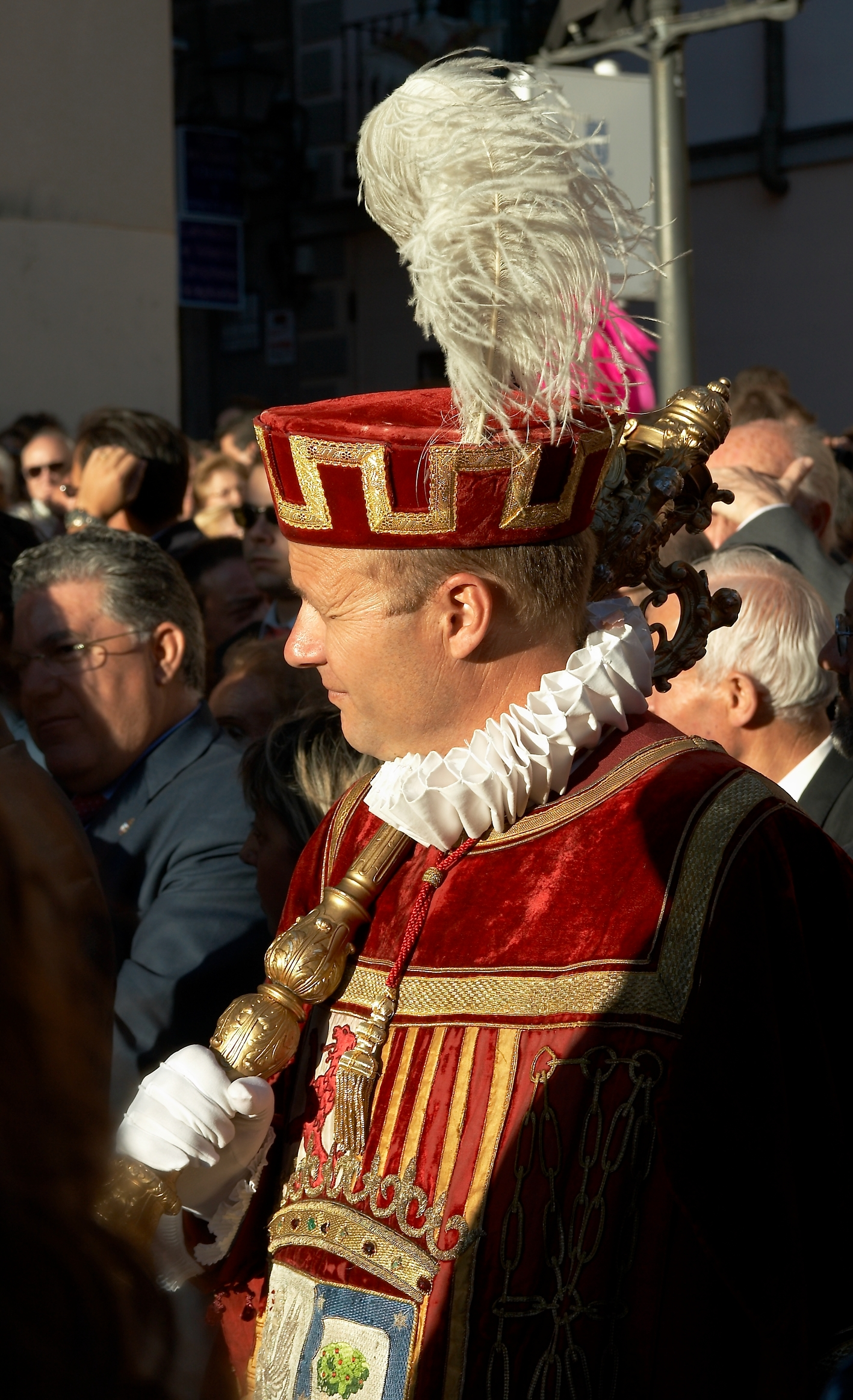 Un macero del ayuntamiento de Madrid. Fiestas de la Paloma 2007, Madrid, España.